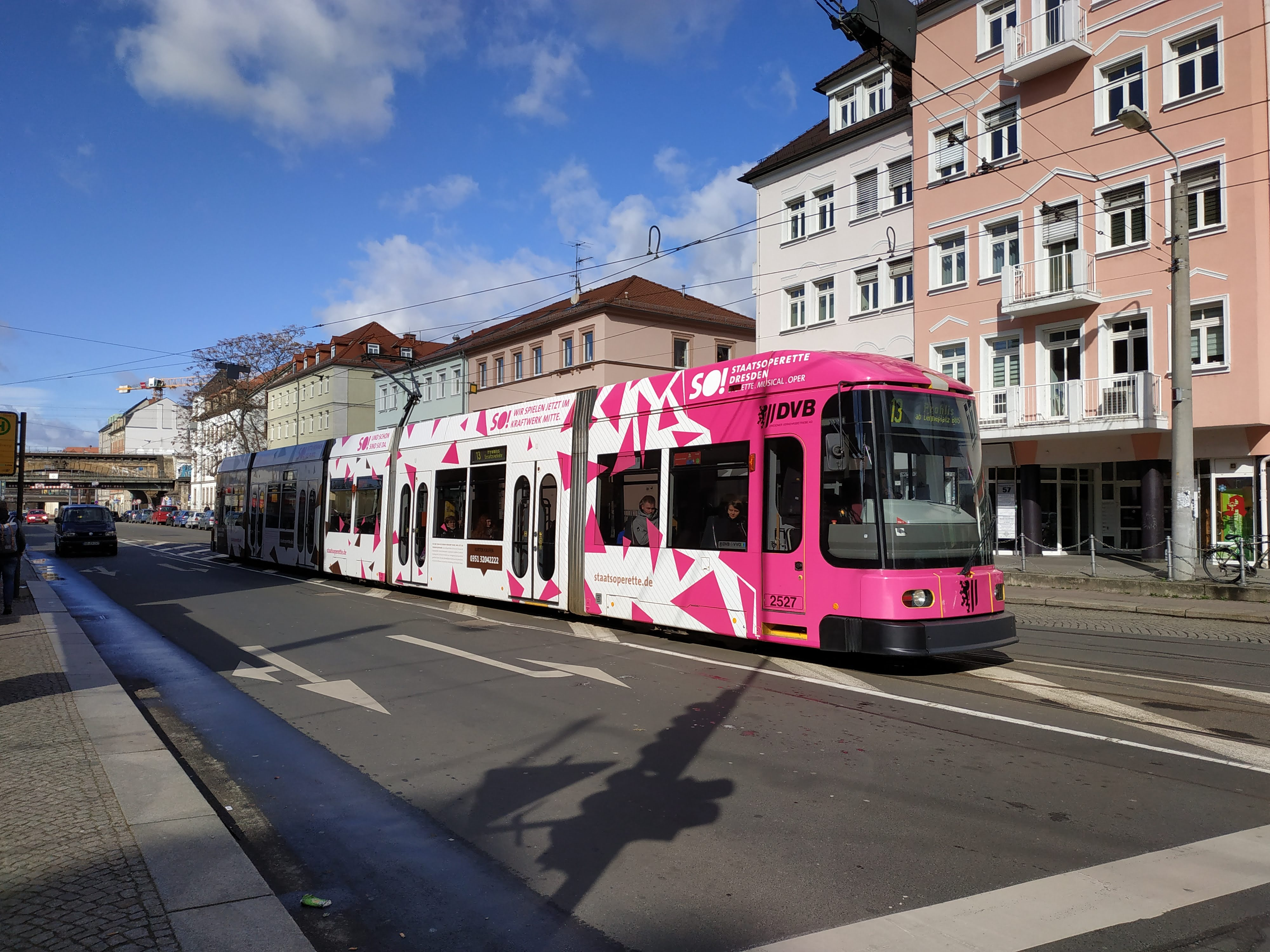 NGT6DD (Dresde) n°2527 (2019)